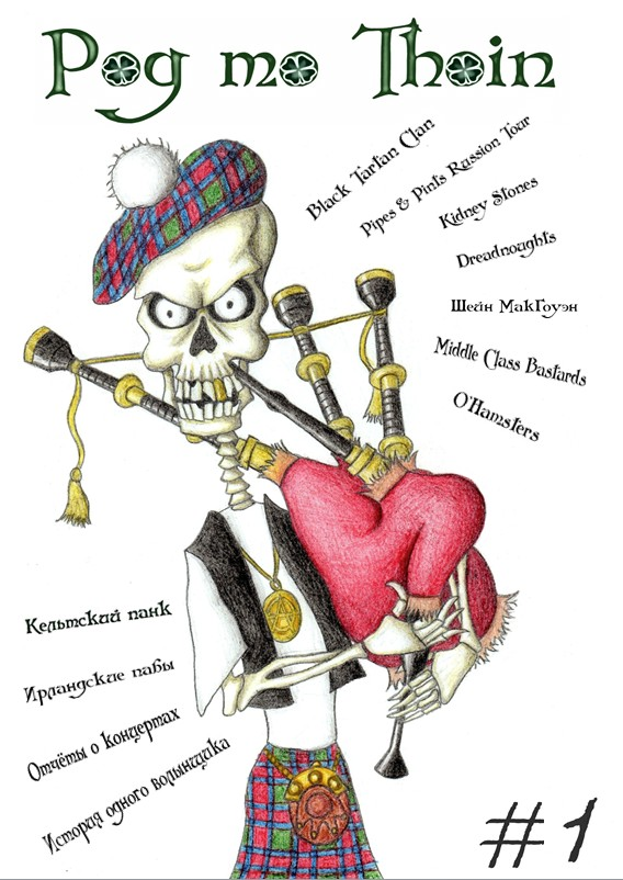 1-й номер новосибирского фанзина "Pog mo Thoin"